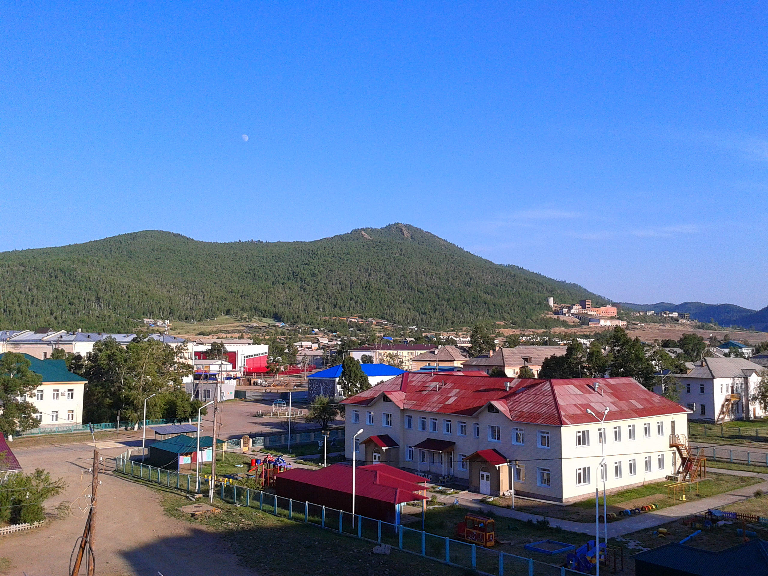 Вид на город Закаменск.